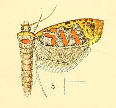 Sanguinograptis albardana